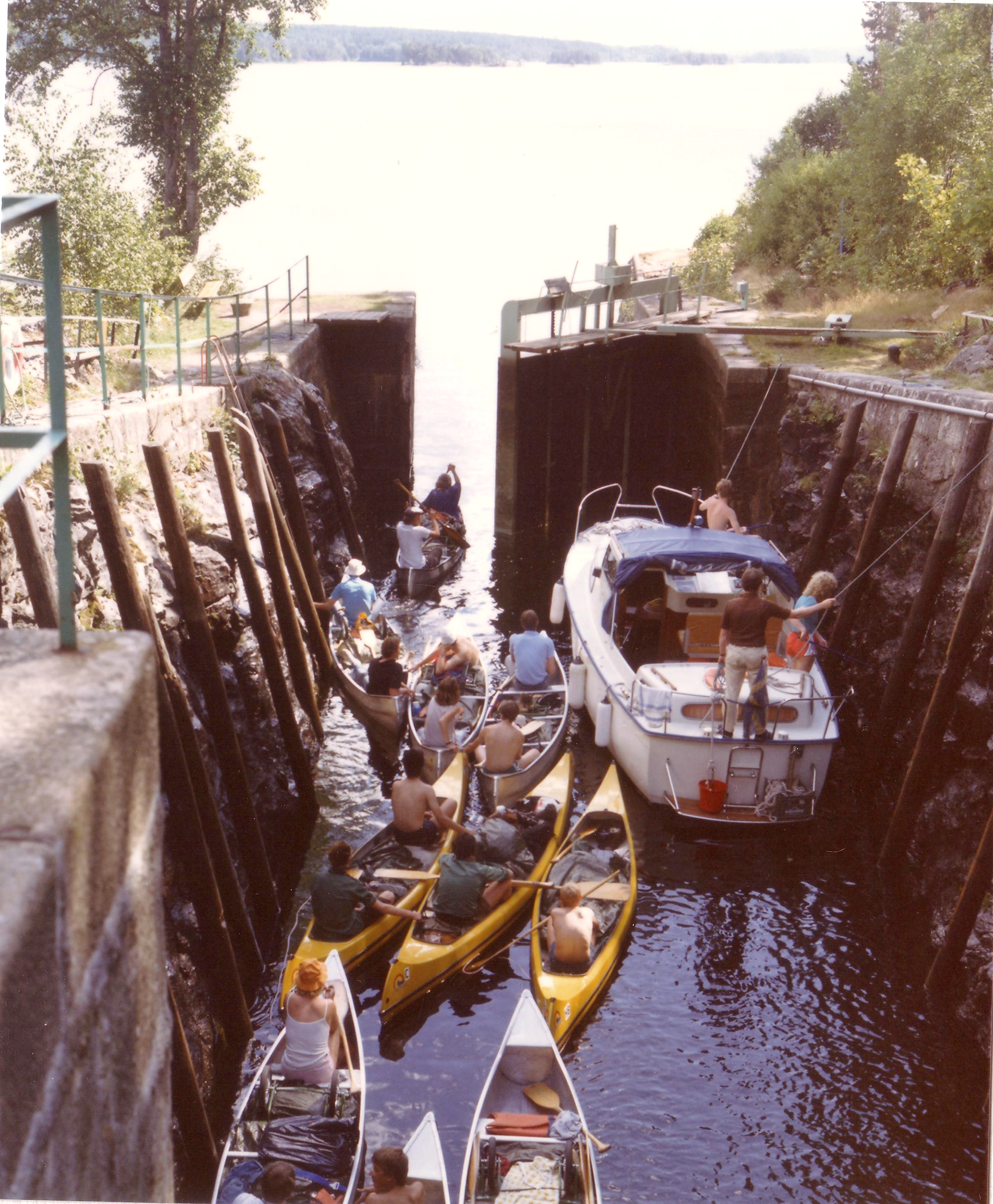 Schleuse zum See Lelången in Dalsland (Schweden)